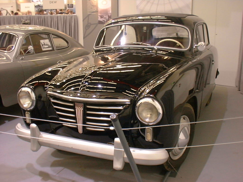 Goliath GP700 (1950-56)